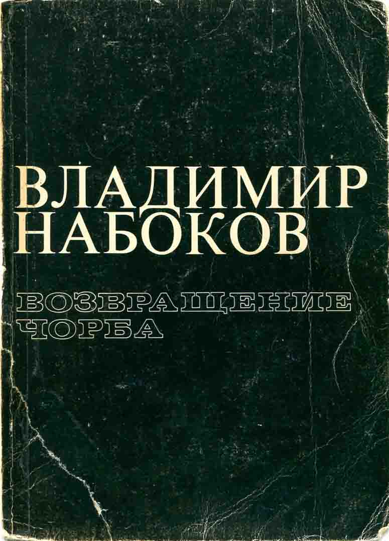 Обложка сборника рассказов В. В. Набокова "Возвращение Чорба", Анн Аббор: Ардис, 1976.